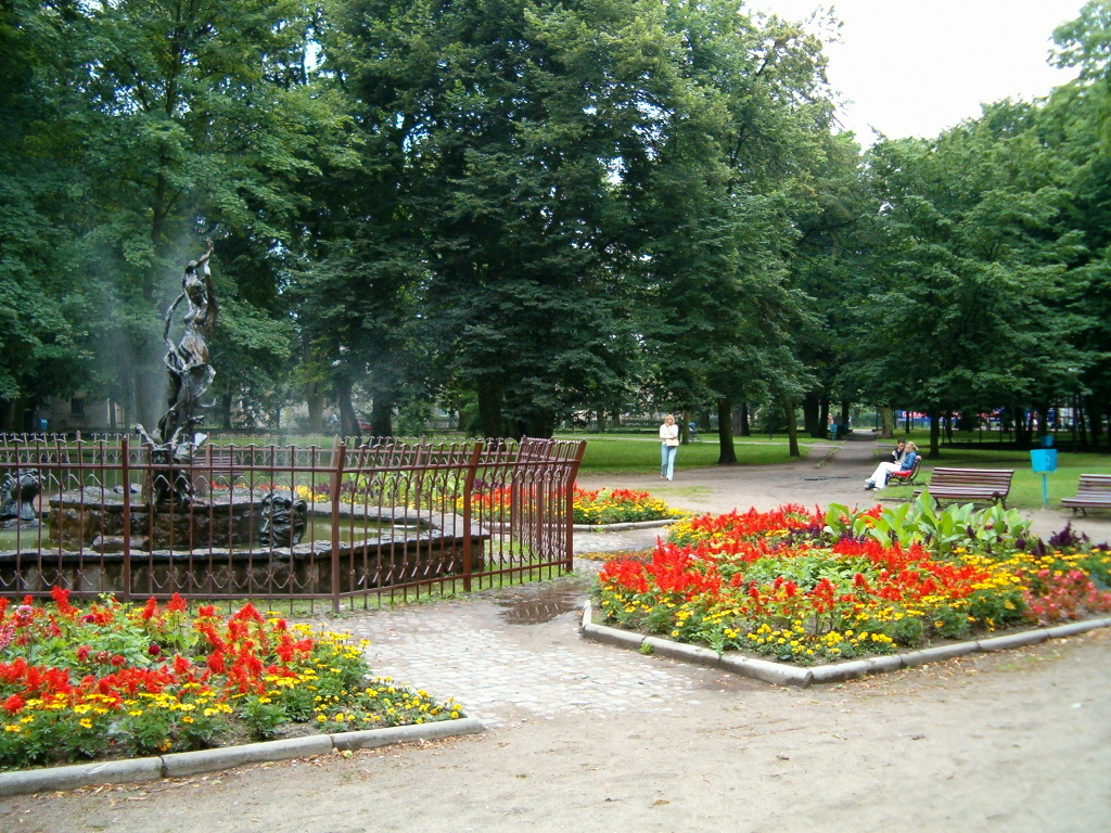 Park miejski, 2003